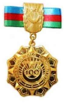 This is the picture of the Jubilee medal dedicated to "The 100th anniversary of the Azerbaijan Democratic Republic (1918-2018)". It is launched according to the Decree of the President of the Republic of Azerbaijan from May 1, 2018